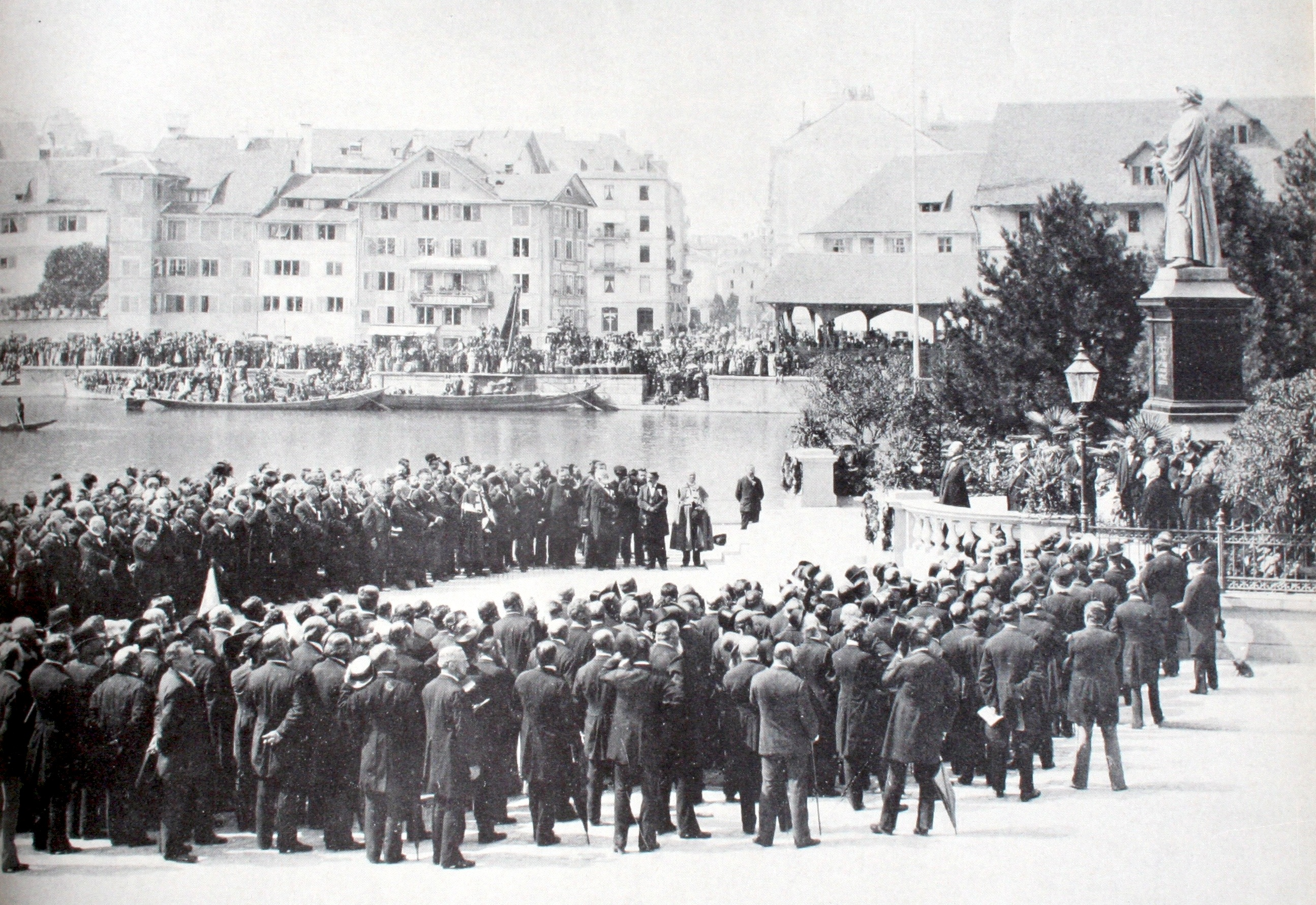 Einweihung des Zwinglidenkmals am 15. August 1885.